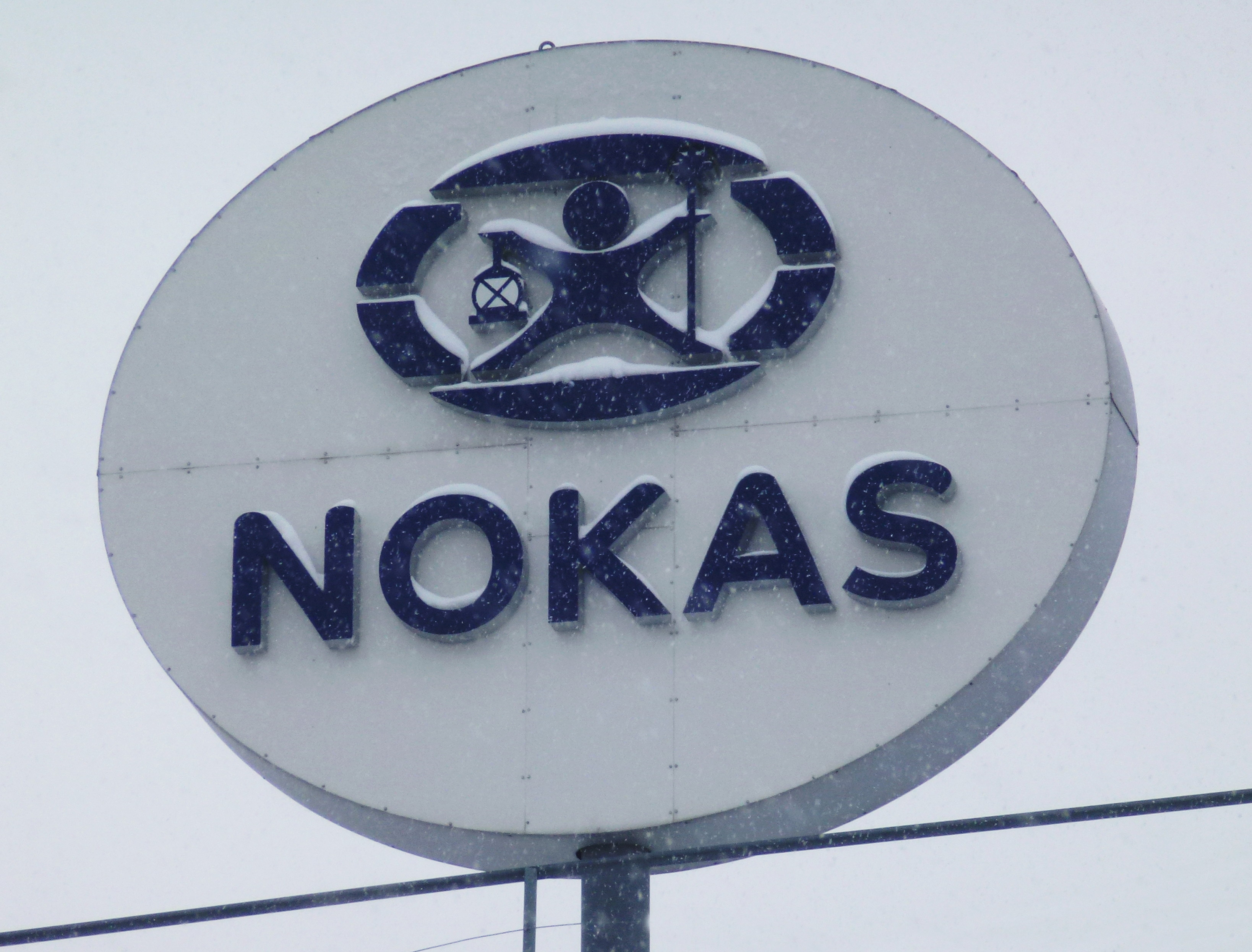 Nokas skylt i Västberga